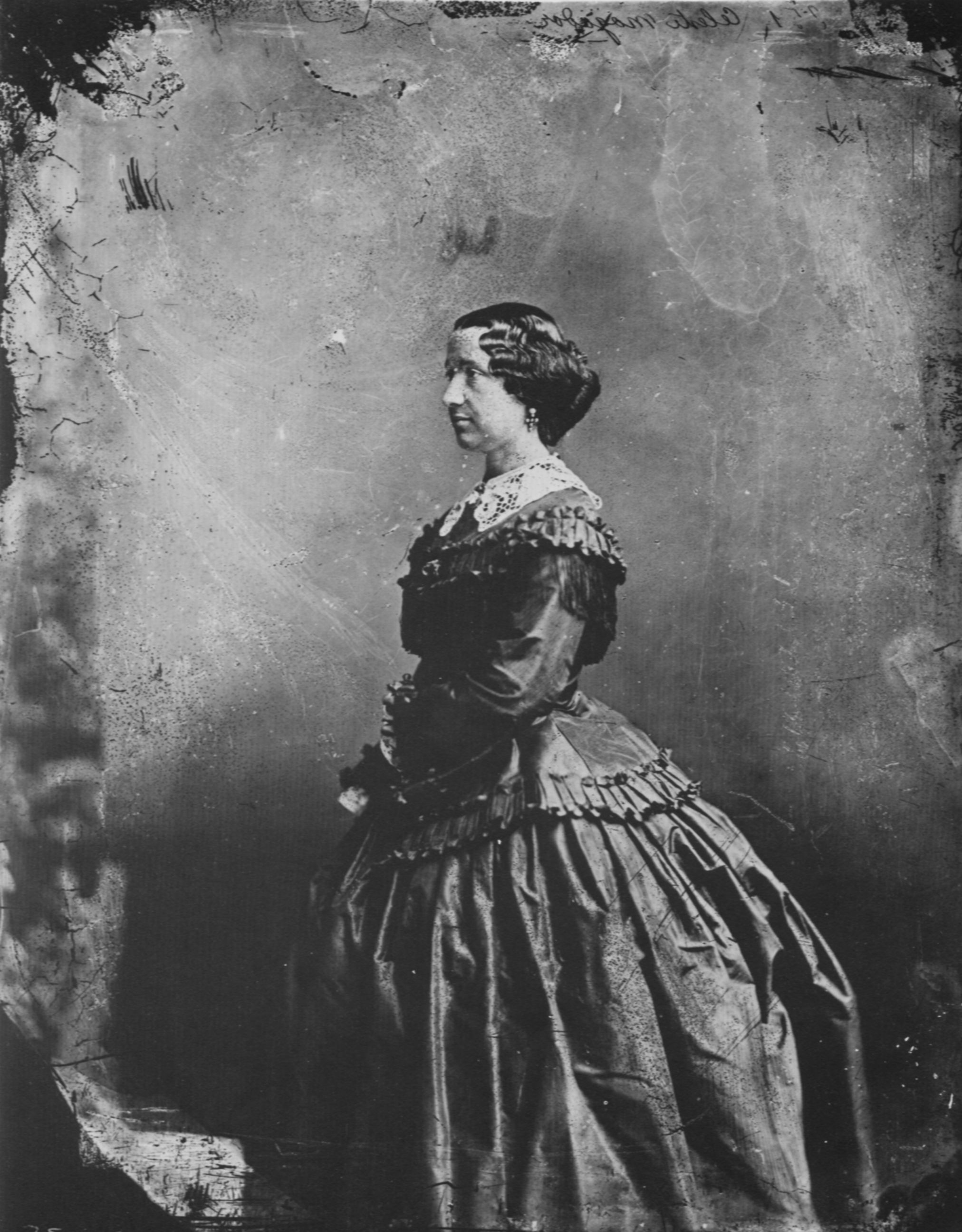 Tournachon, Gaspard-Félix: Mogador (Comtesse de Chabrillan) (1824-1909)